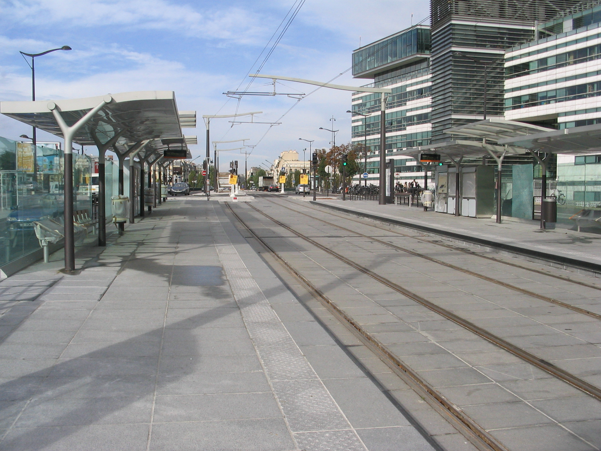 La station Pont du Garigliano du tramway T3 à Paris.